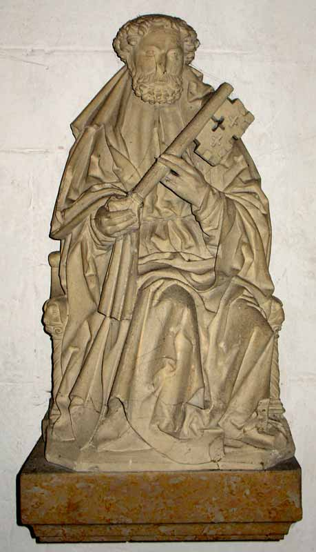 Der Apostel Petrus in Stein gehauen durch Evert van Roden